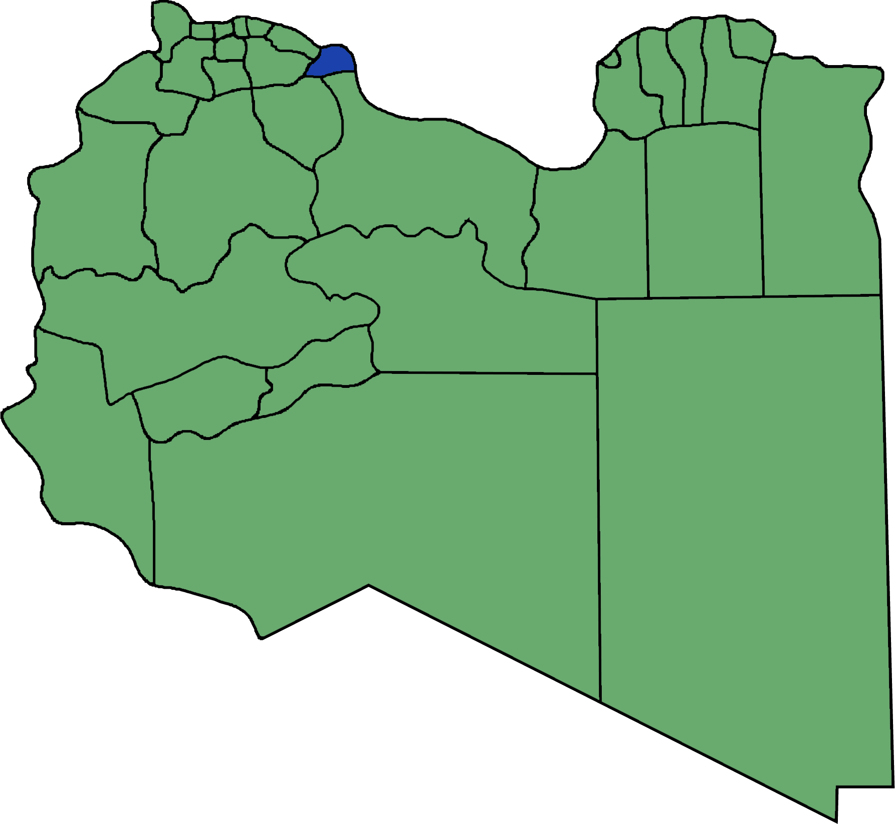 Die neuen Gemeinden (Munizipien) in Libyen. Misratah hervorgehoben.